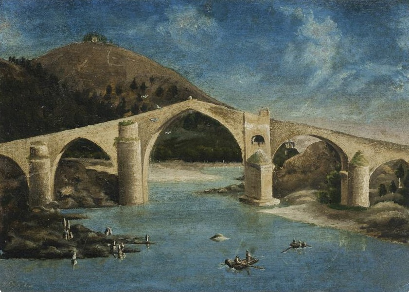 pintura sobre metal